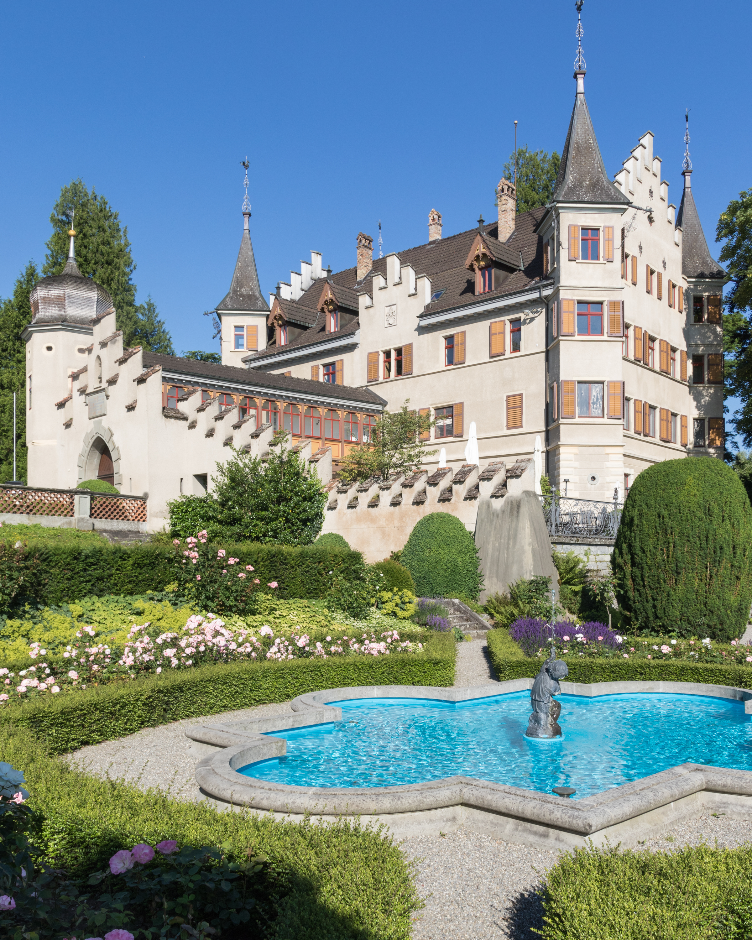 Seeburg Kreuzlingen (Ostansicht)